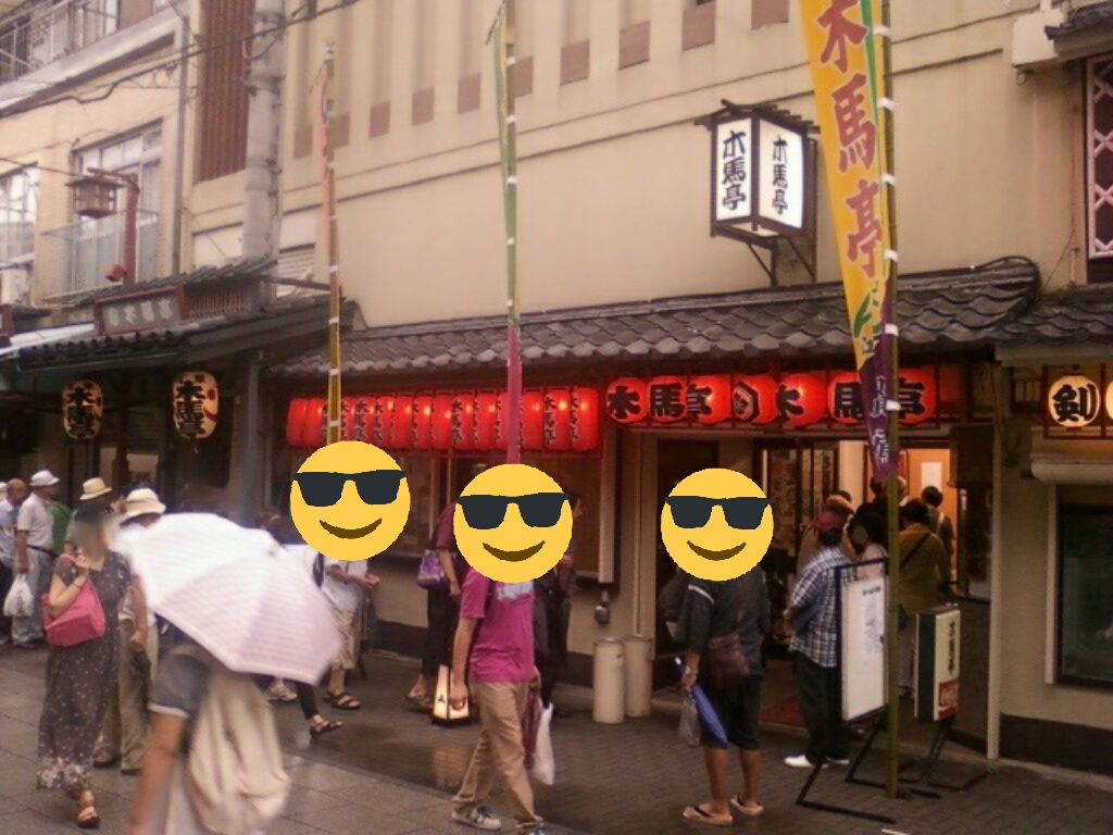 浪曲定席である木馬亭の風景